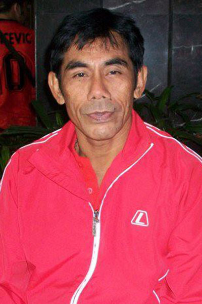 Elly Idris dalam persiapan melawan AC Milan Glorie di Jakarta